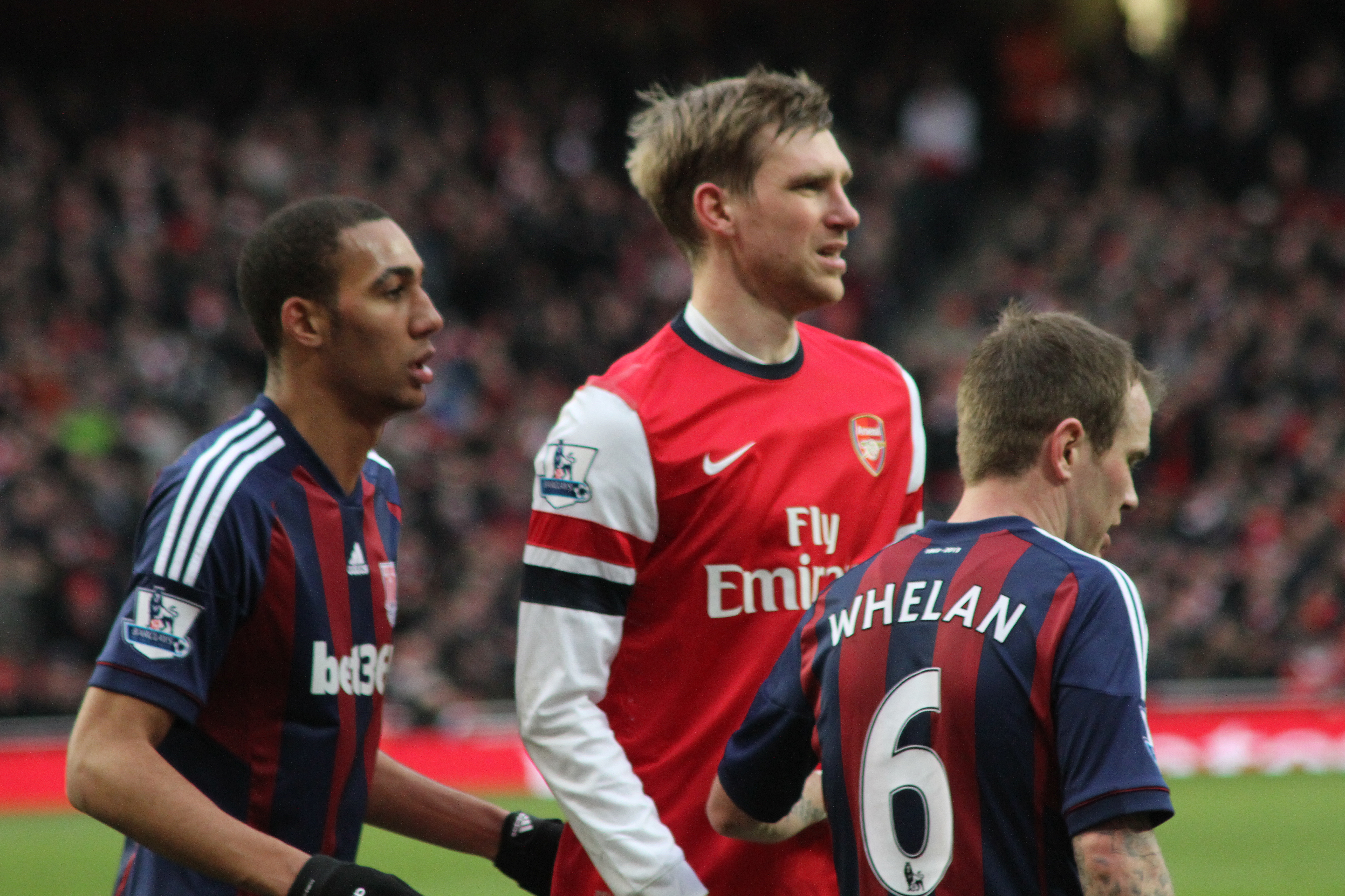 Arsenal vs Stoke, February 2013.